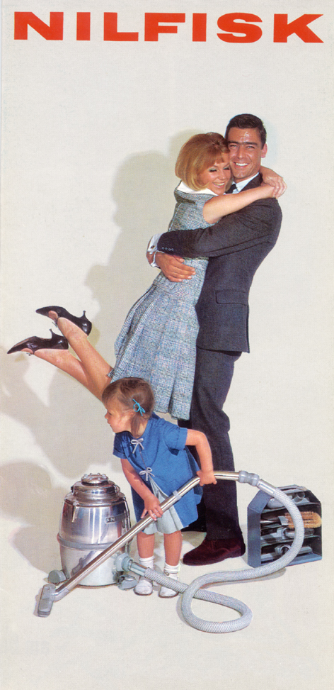 Reklame for Nilfisk GS 80 støvsuger.